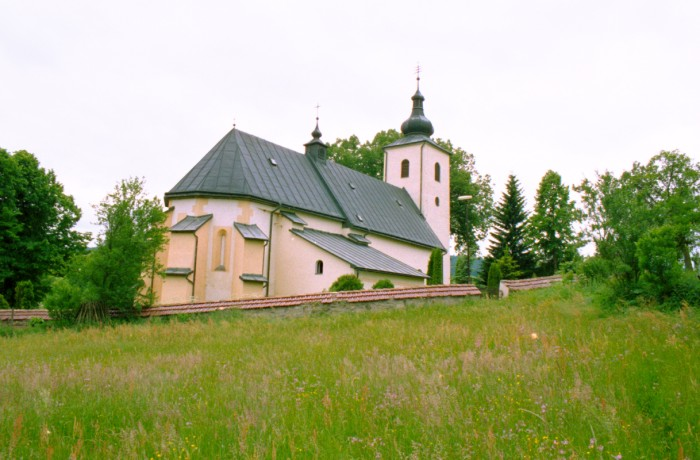 Church sv. Bartolomeja Apostola-Richvald Village (Slovakia)